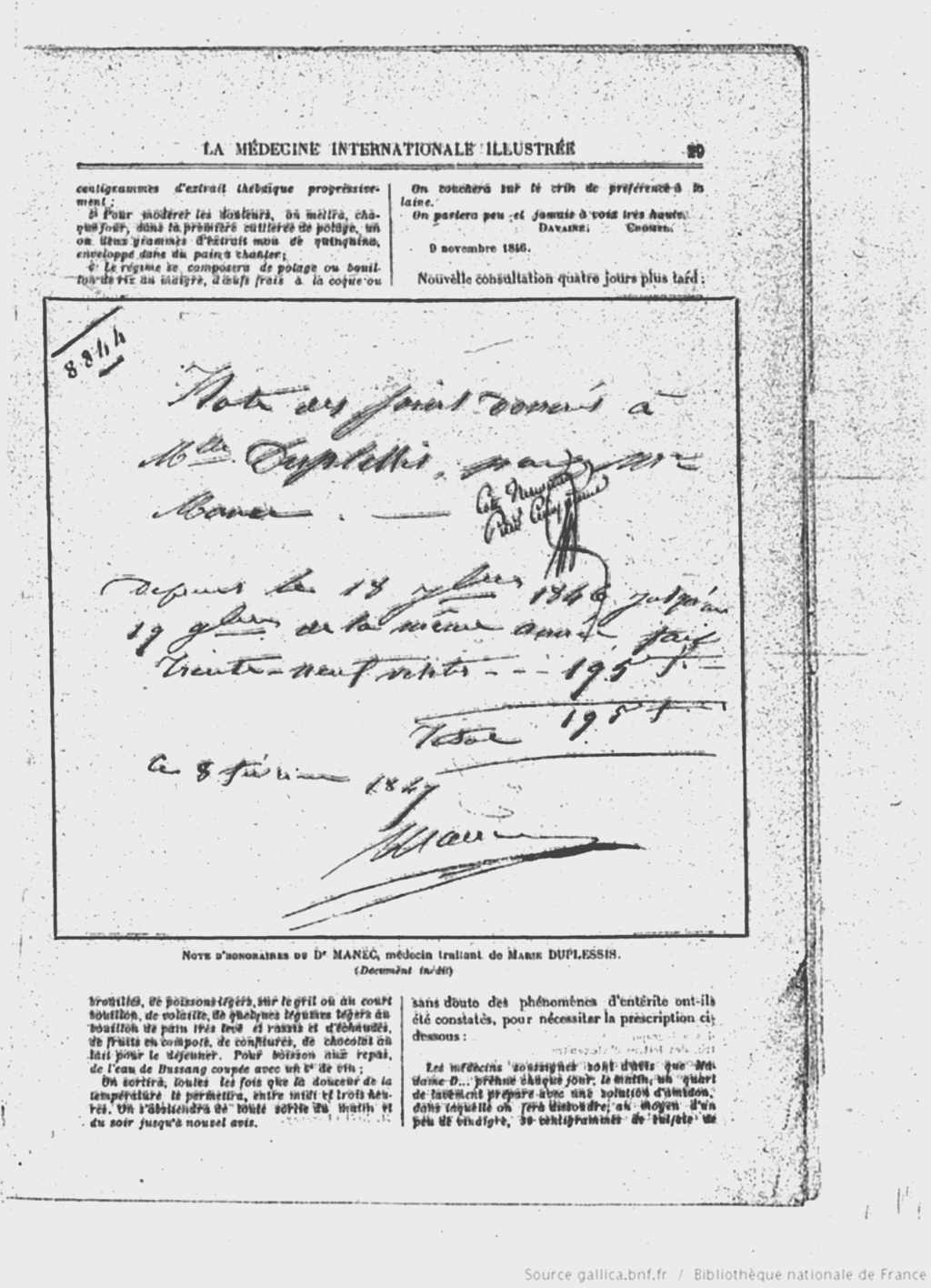 La Médecine internationale Éditeur : [s.n.?] (Paris) Date d'édition : 1893